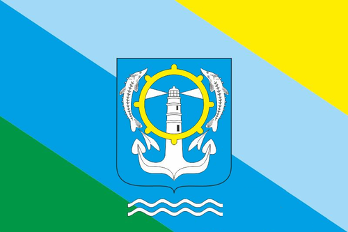 Прапор Генічеська